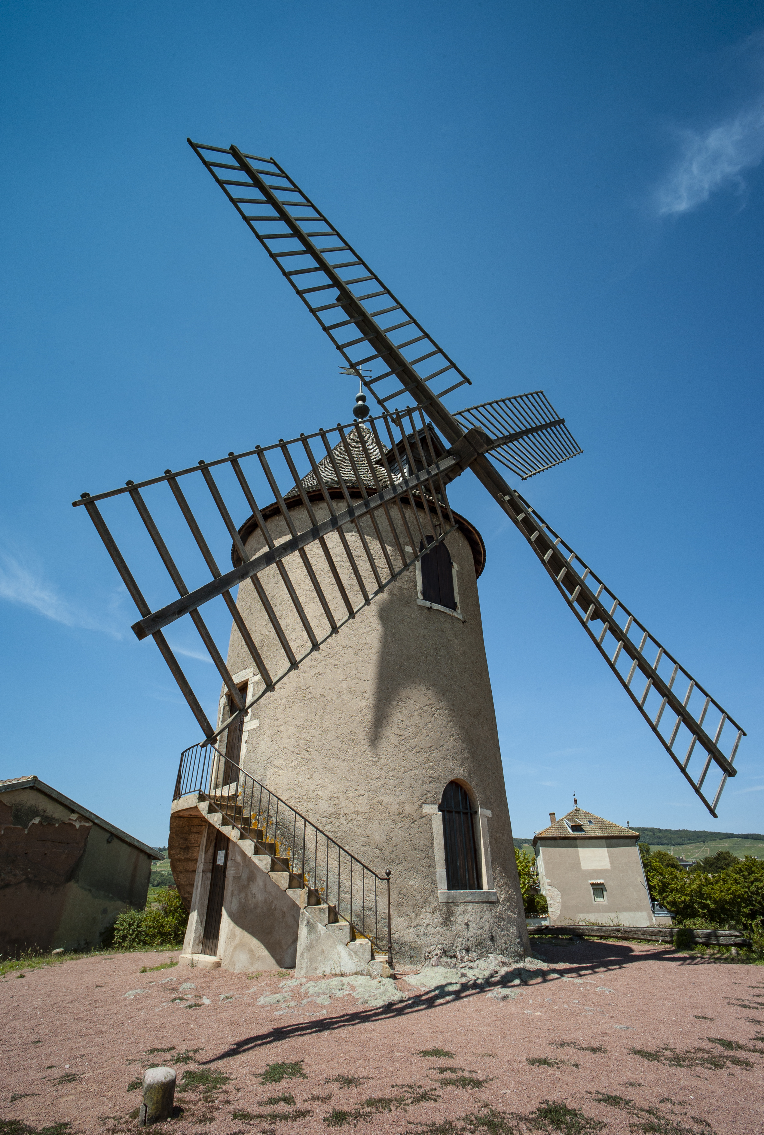 Le Moulin à Vent qui donne son nom au Cru du Beaujolais est situé à Romanèche-Thorins